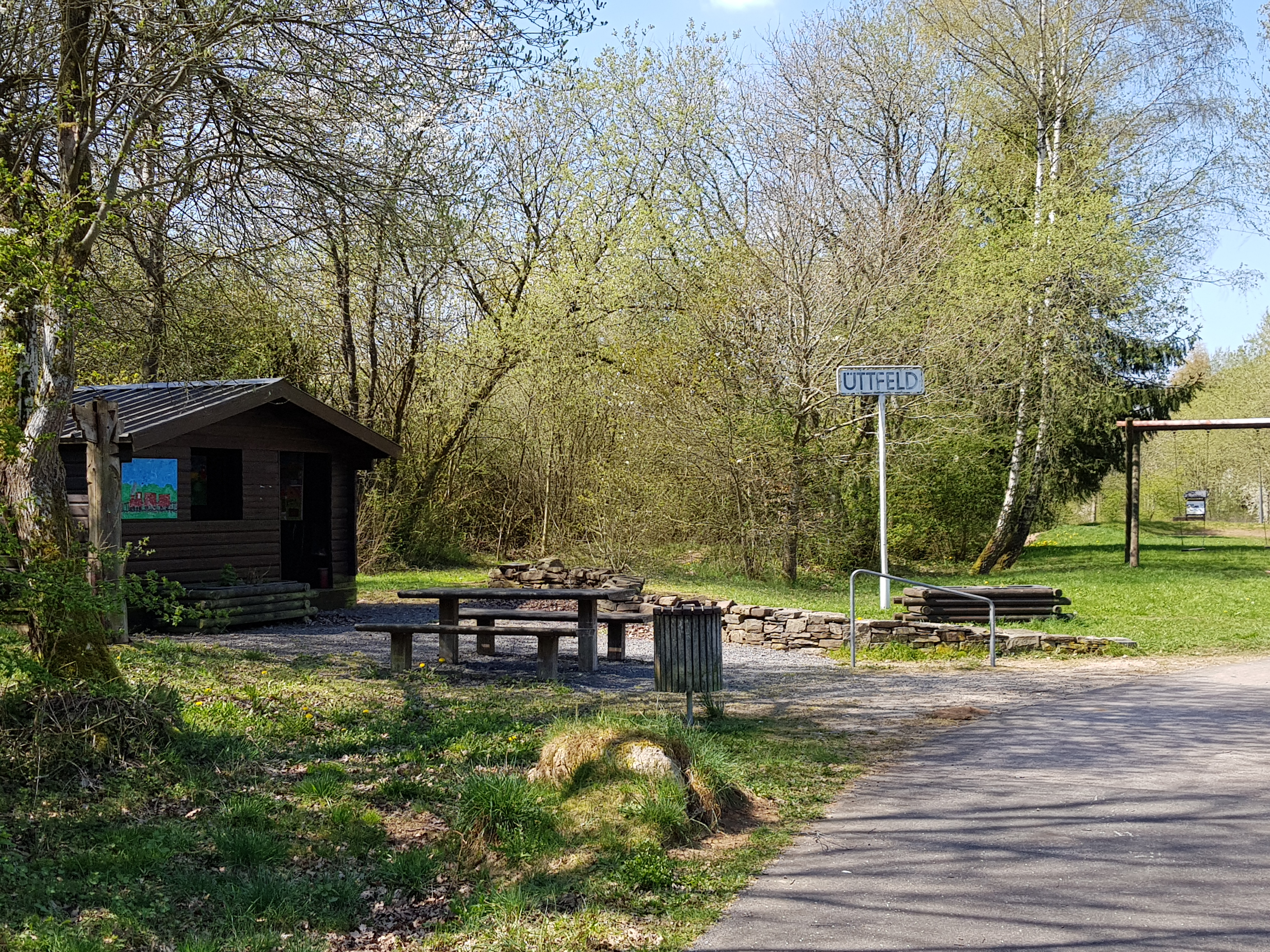 Der Bahntrassenradweg mit Schutzhütte, Sitzgruppe und Bahnhofsschild am ehem. Bahnhof Üttfeld.